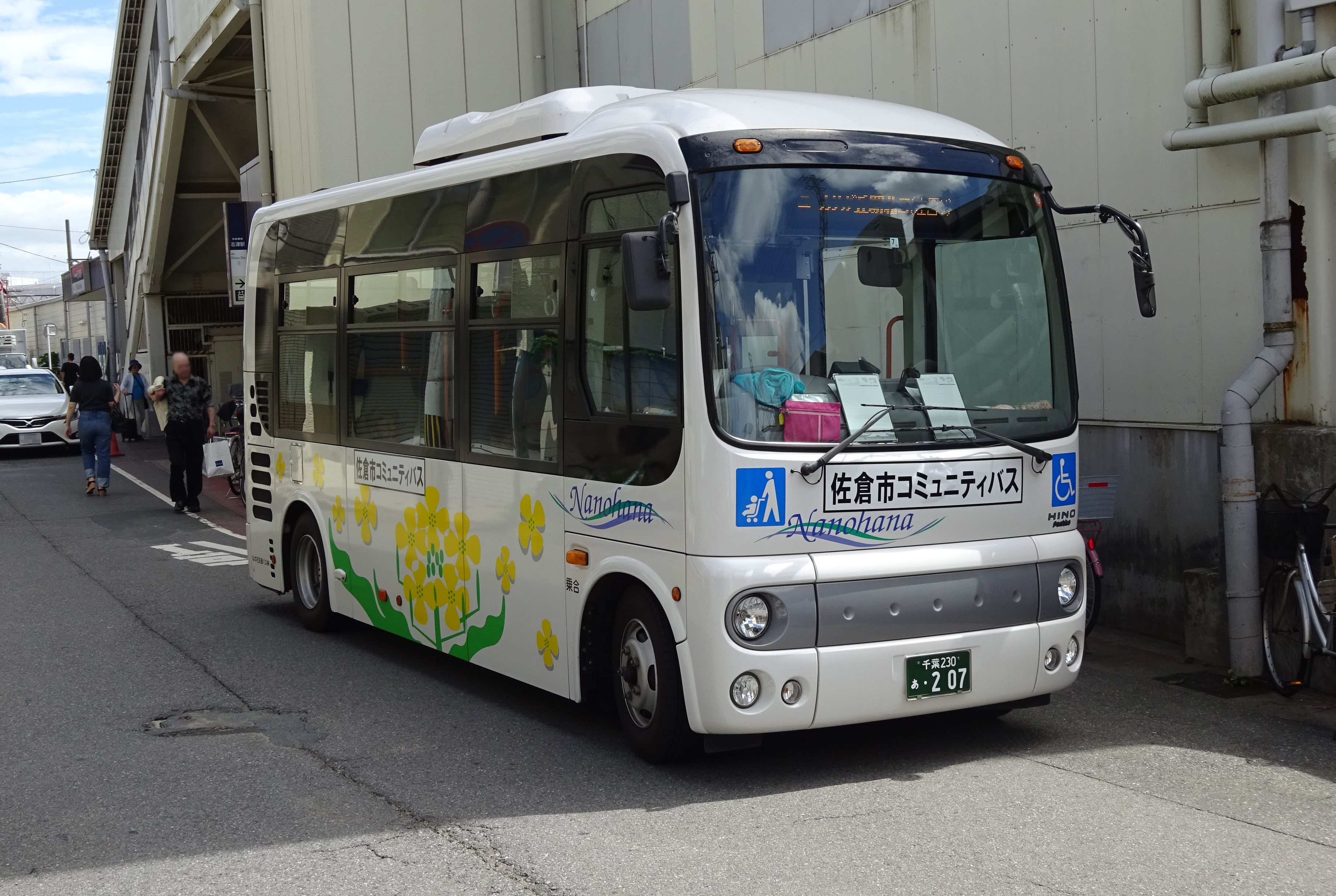 佐倉市コミュニティバス（志津駅前にて）